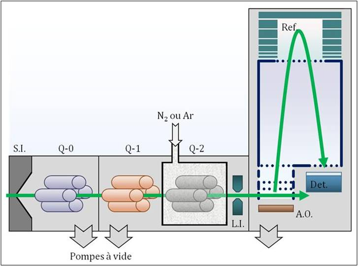 S.I. Source d'Ionisation Q-0, Q-1 et Q-2: Quadripôles L.I. Lentilles ioniques A.O. Accélérateur Orthogonal Ref. Réflectron Det. Détecteur